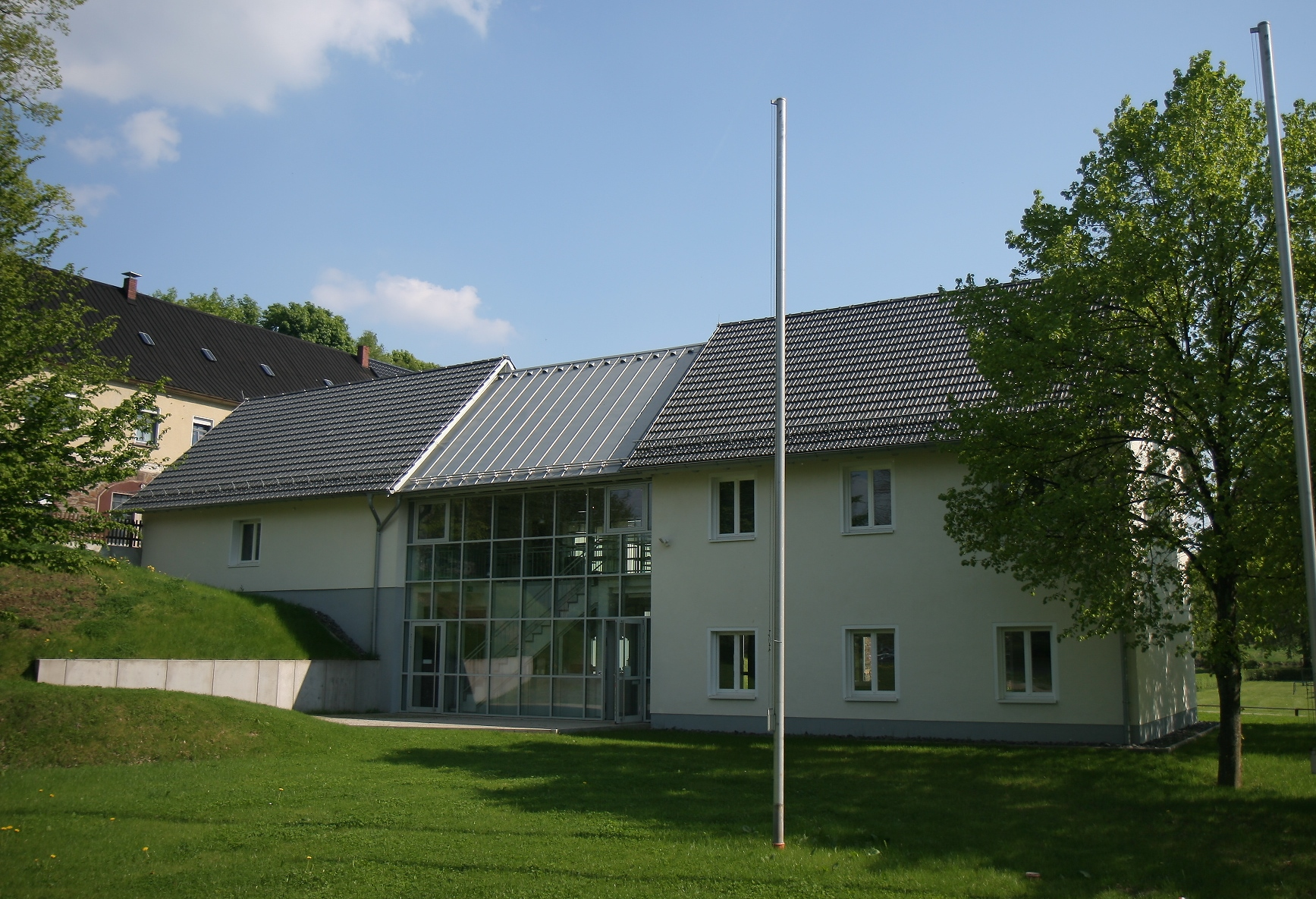 Ausstellungs- und Eingangsgebäude „Alte Faktorei“. Museum Wendener Hütte in Wenden.